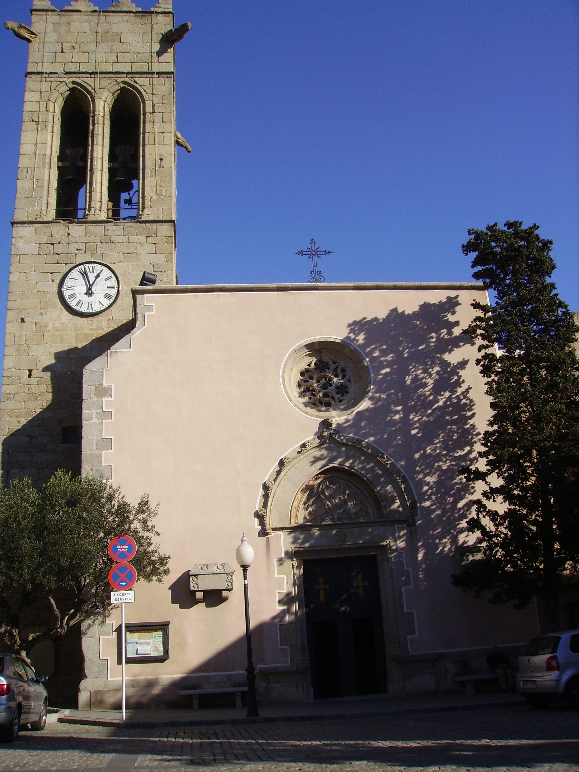 Església de Sant Julià a Argentona, comarca del Maresme, Catalunya.